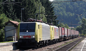 Eine Doppeltraktion aus Dispolok ES 64 F4-031 (vermietet an RailOne) und Lokomotion ES 64 F4-007, mit der neuen Schweizer-Eisenbahn-Revue Werbung, ist mit dem "Winner-Zug" in Oberaudorf unterwegs in Richtung München.